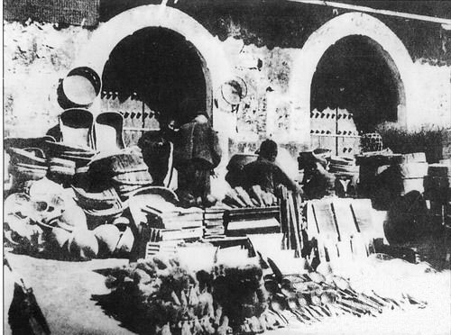 隆福寺山门前的摊位